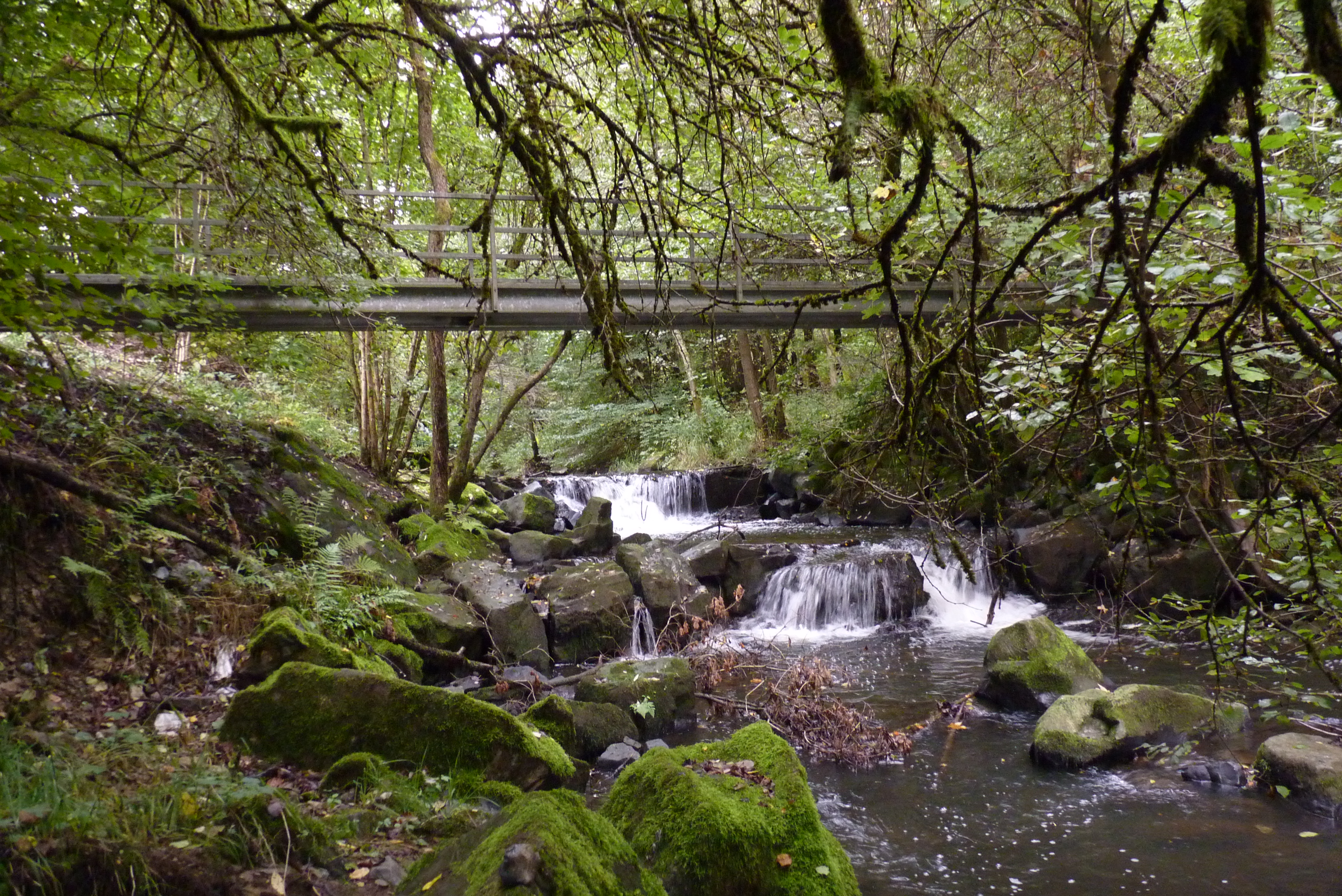 Der Fluss Sieg in einem Wald zwischen Netphen und Deuz